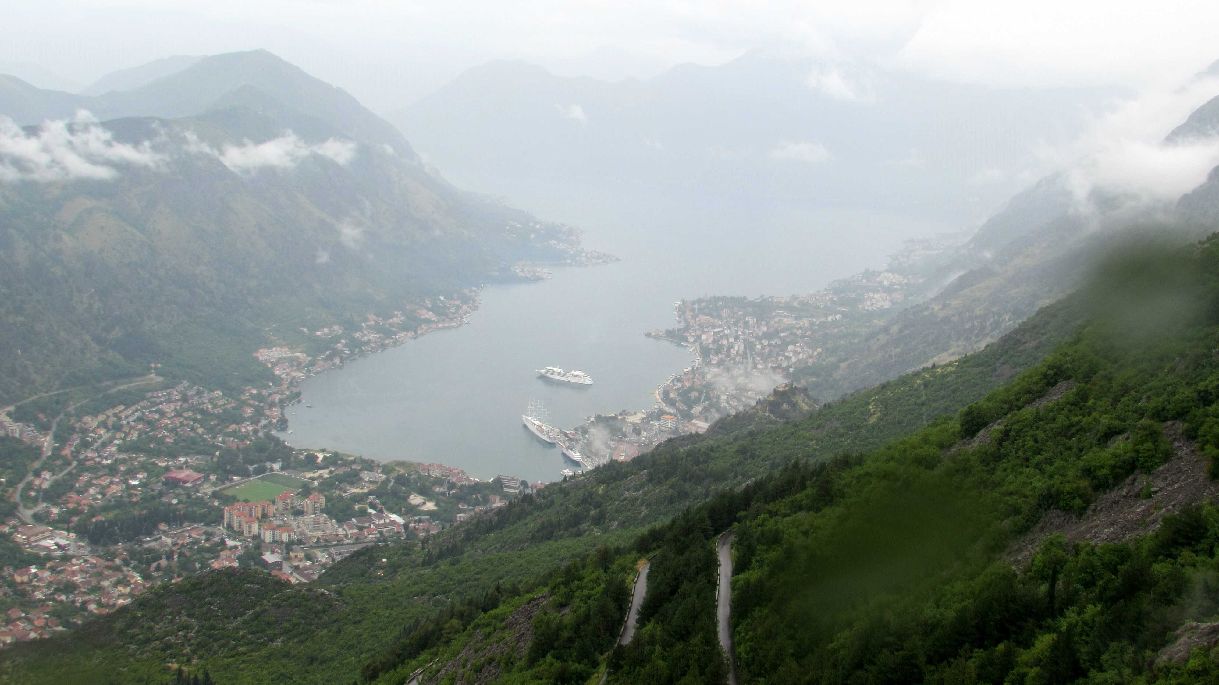 KotorBuchtImDunst2014